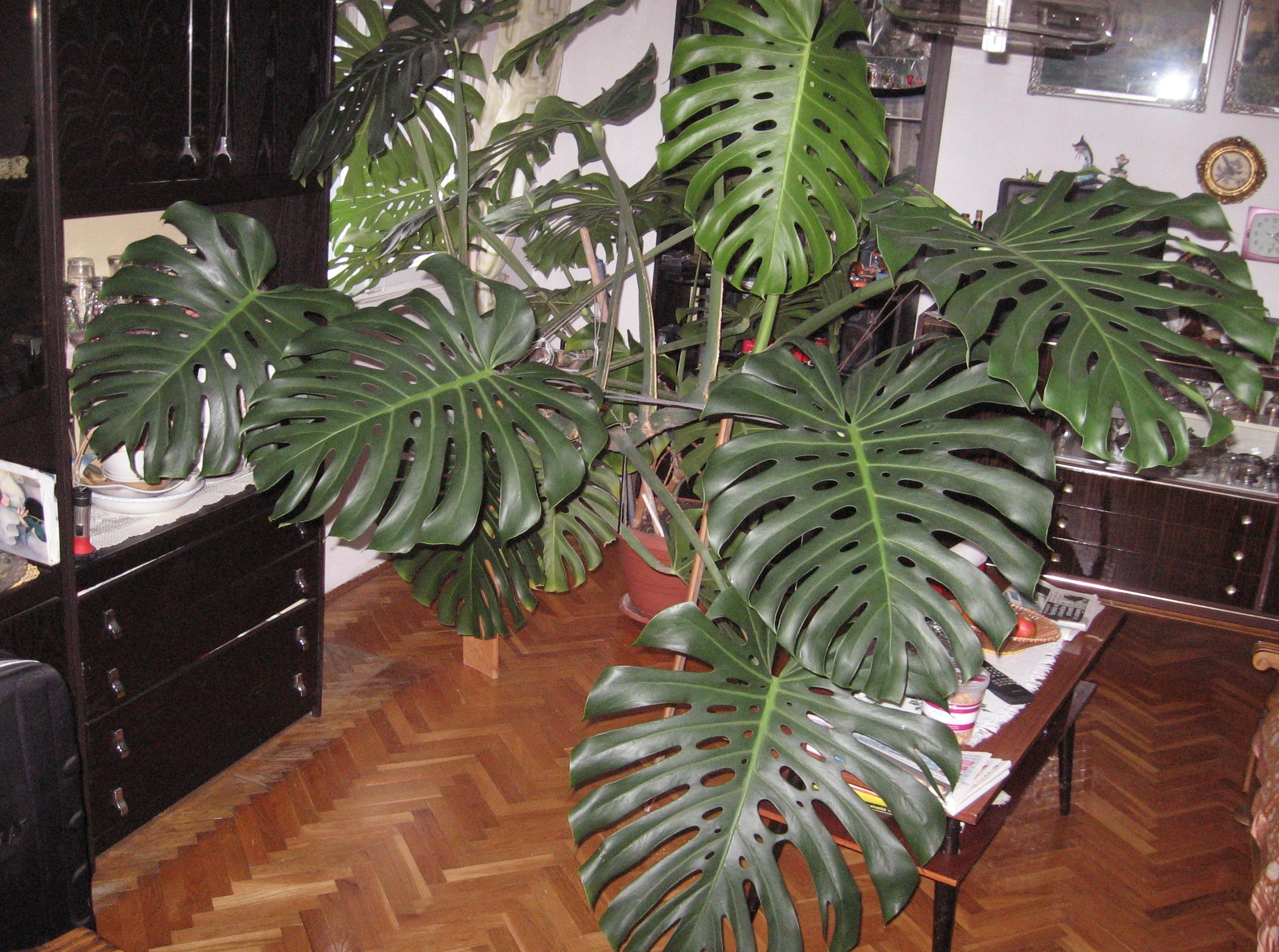 Monstera Former called "Philodendron"